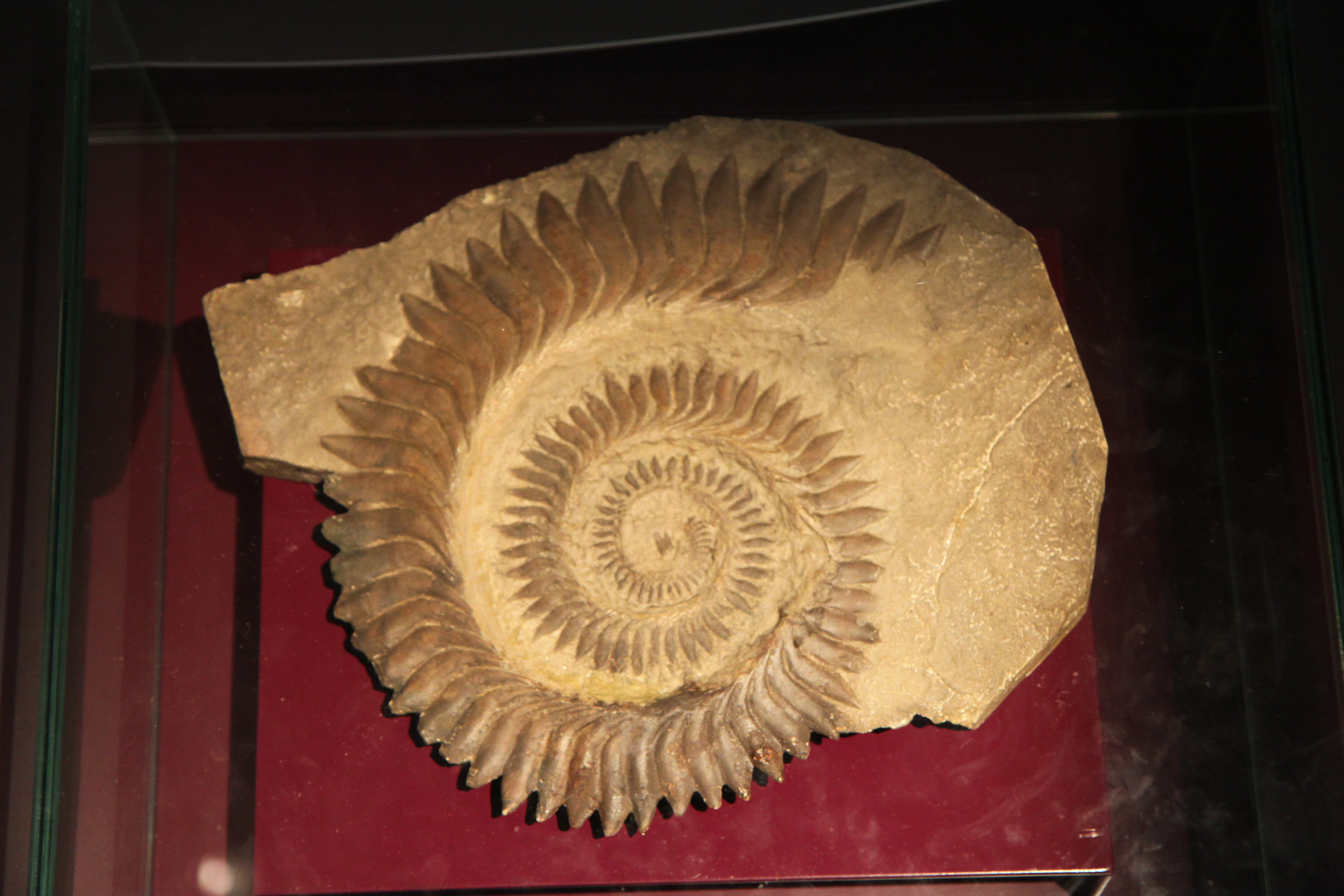 Moulage d'une spirale dentaire d'helicoprion à l'aquarium de la porte Dorée à Paris lors d'une exposition temporaire sur les requins.